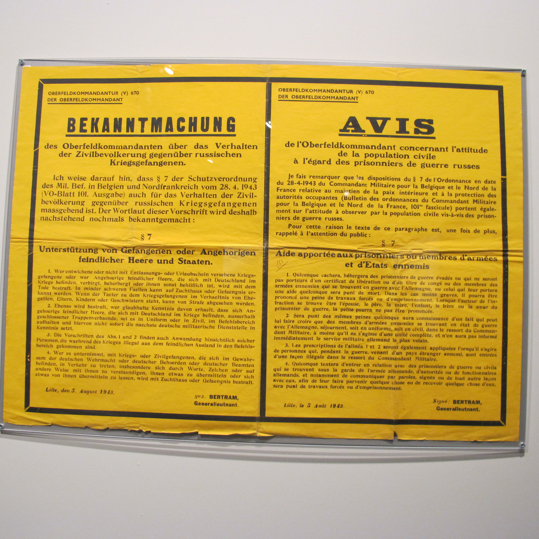 Avis concernant l'attitude de la population civile à l'égard des prisonniers de guerre russes (5 août 1943), signé (Georg) Bertram